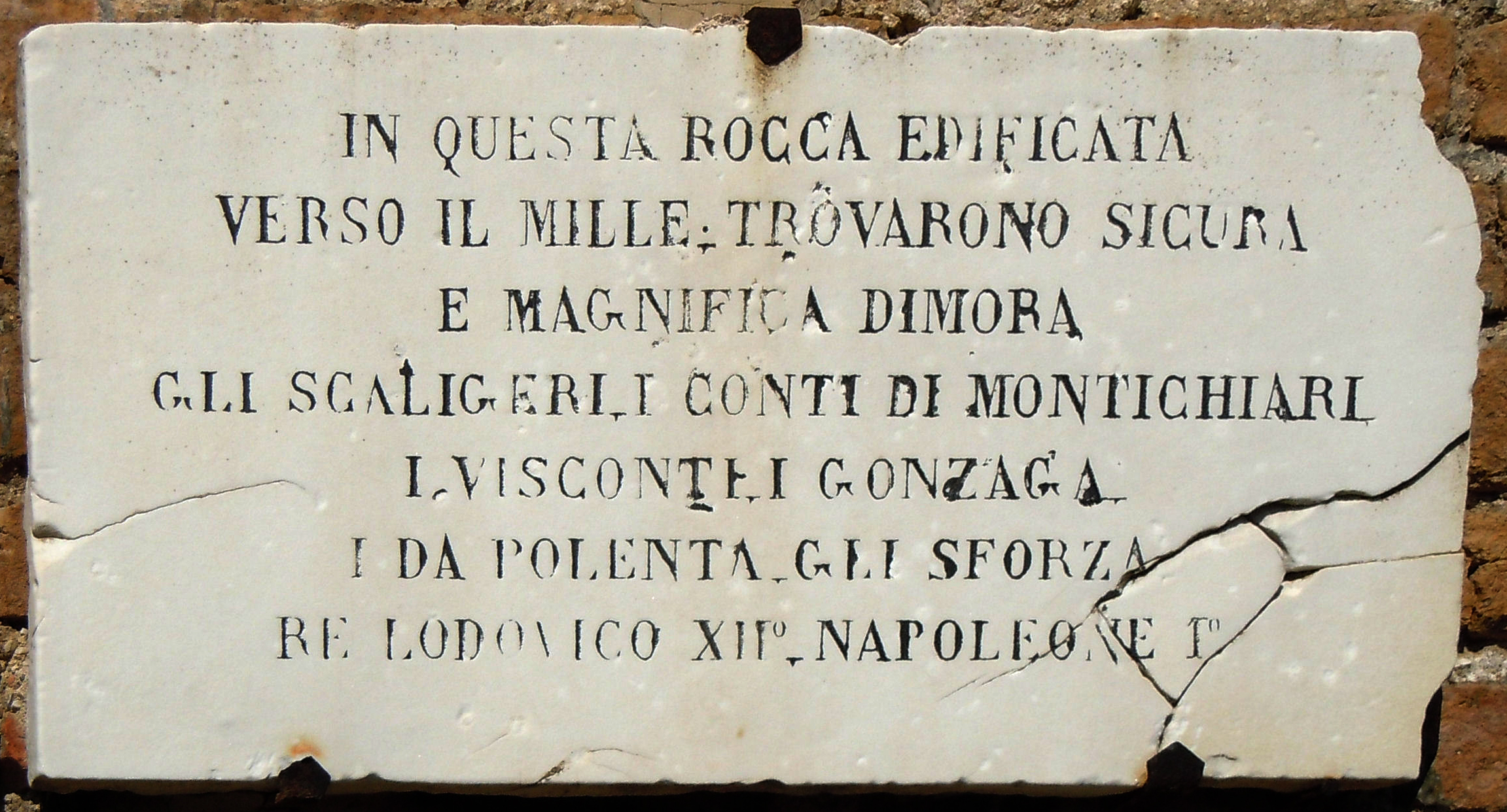 Lapide posta all'ingresso della Rocca di Lonato.